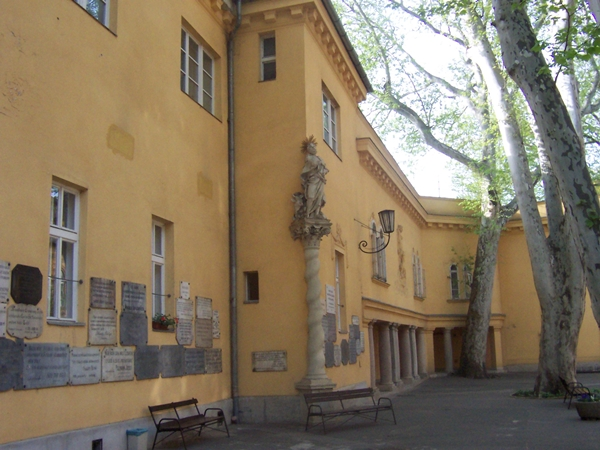 A Szent Lukács gyógyfürdő kertje Szent Lukács szobrával, falba épített hálatáblákkal (Budapest, II. ker.)